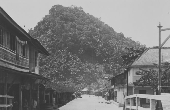 foto. Pemangkat in West-Borneo.